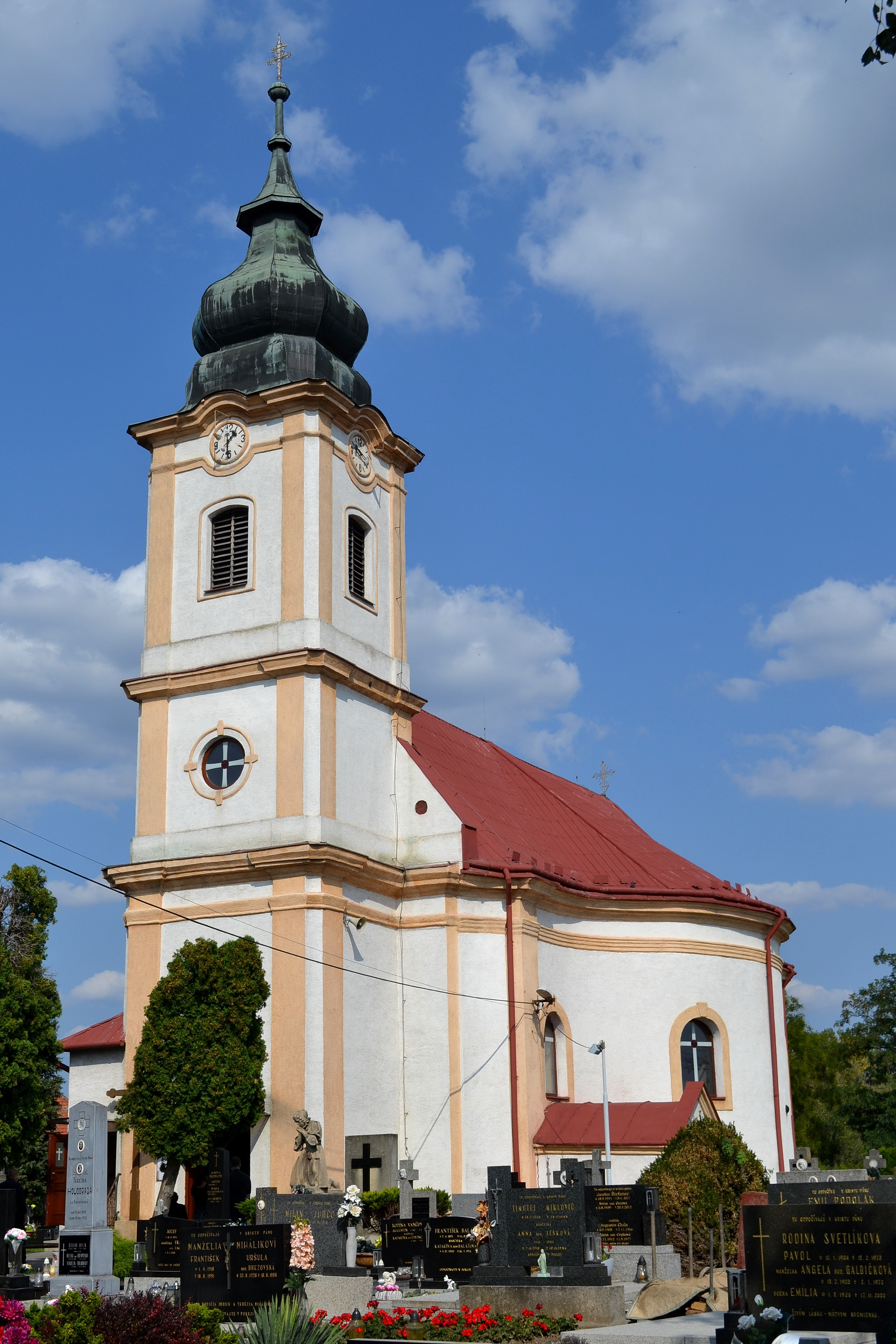 Červeník (okr. Hlohovec), Kostol Obetovania Panny Márie; celkový pohľad